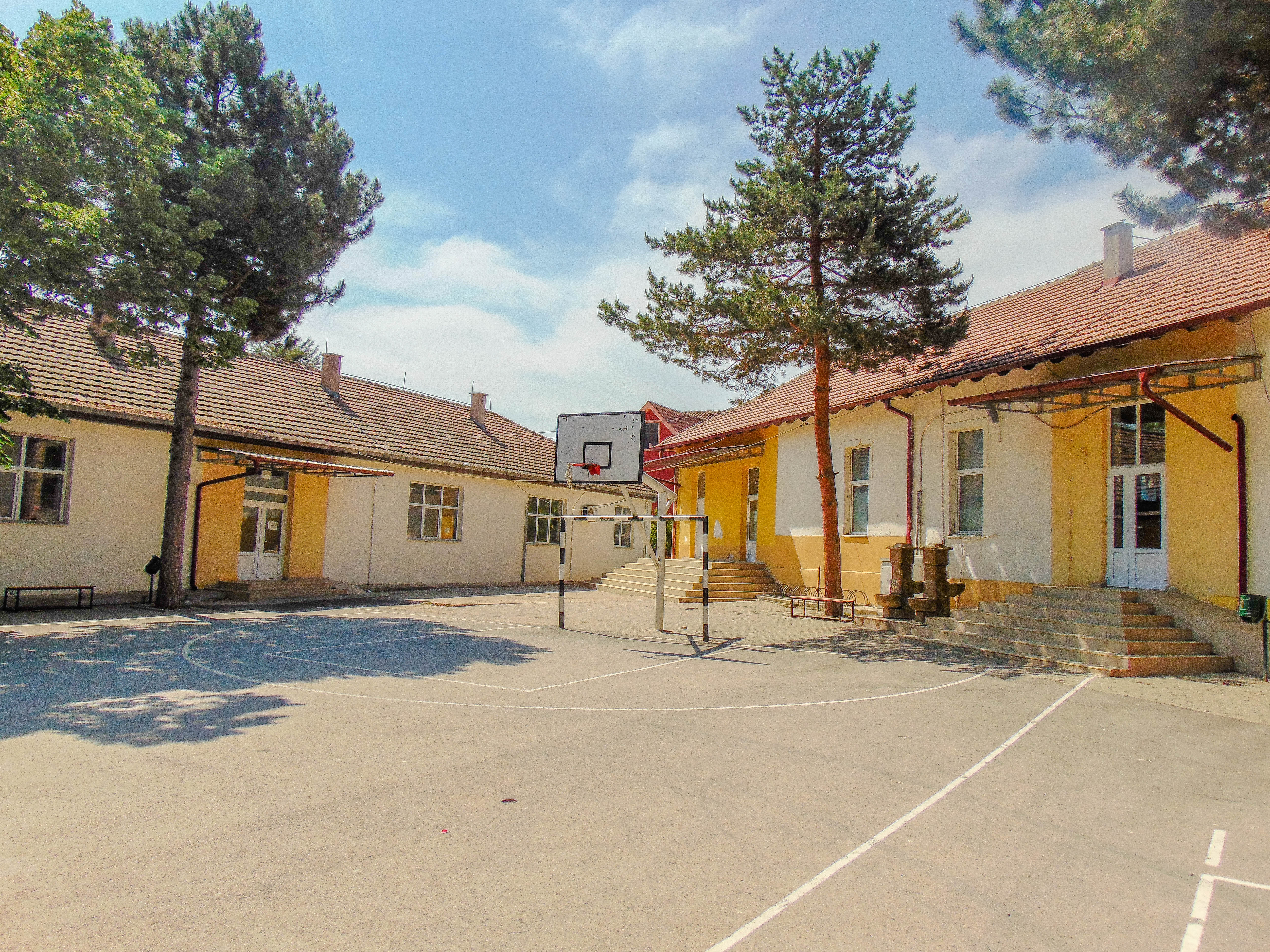 ОУ „Коста Рацин“ – Подареш